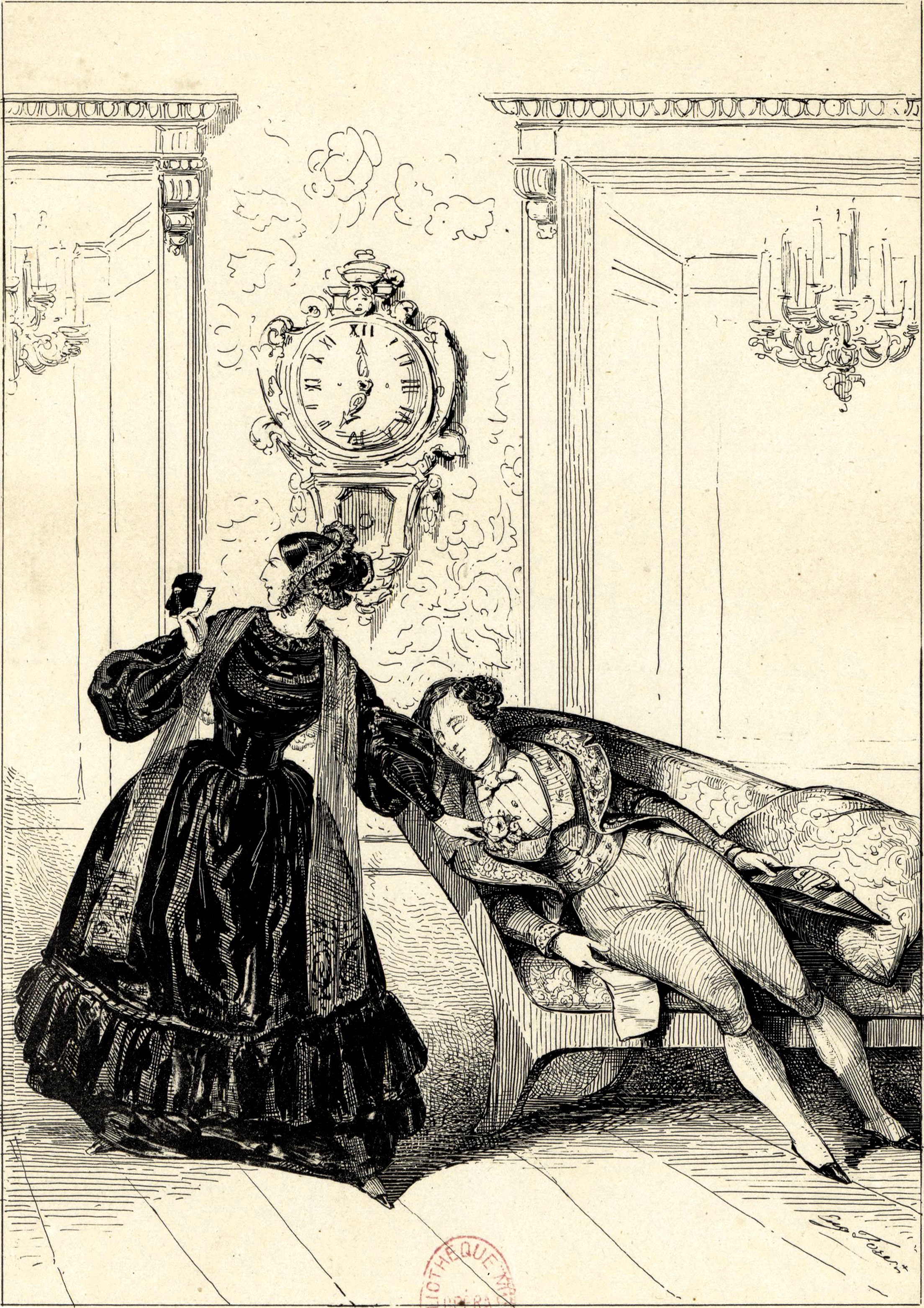 Acte 1 du Domino Noir de l'opéra-comique de Daniel-François-Esprit Auber, sur un livret d'Eugène Scribe. Horace fait semblant de dormir. Angèle (le "Domino Noir") le reconnait.